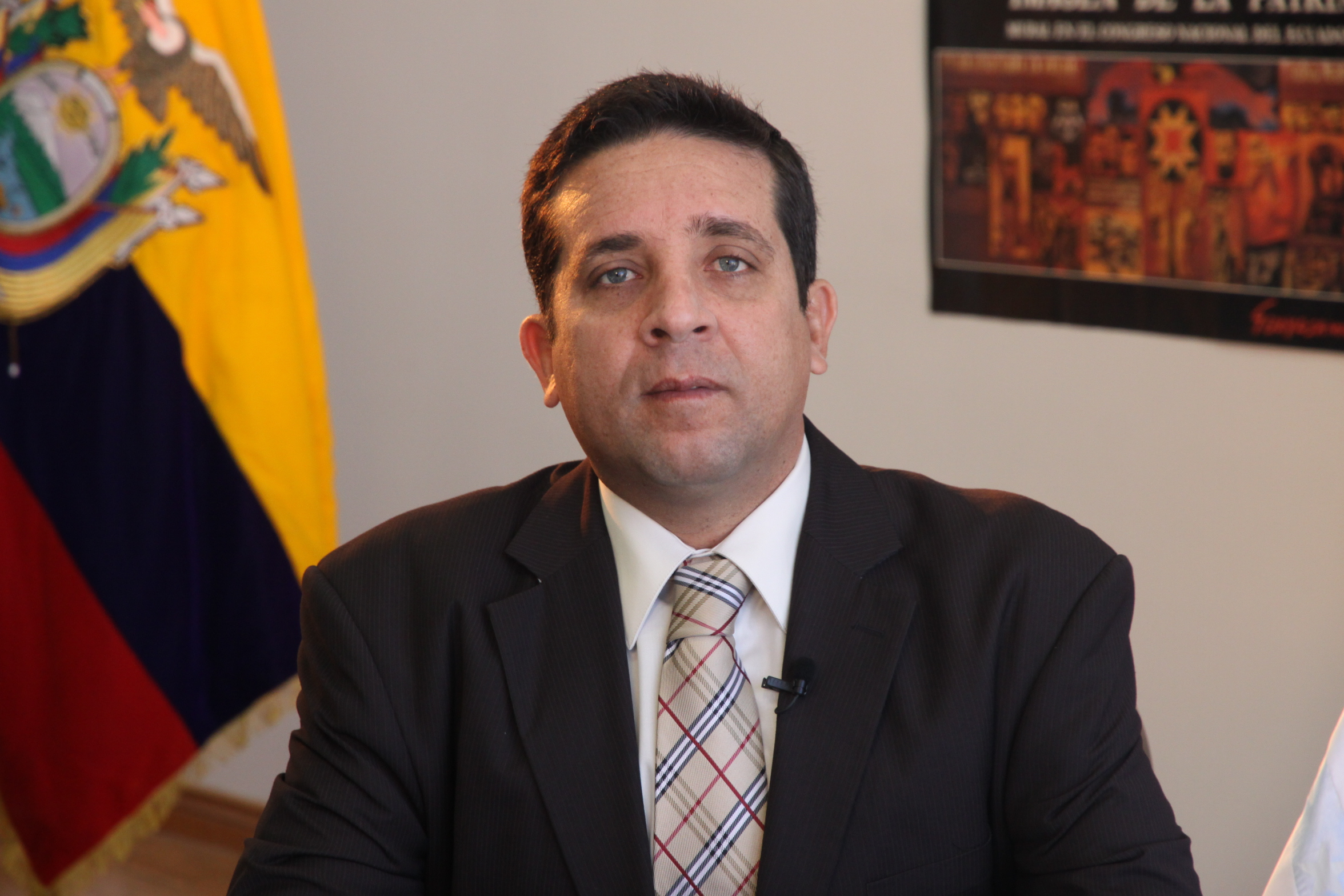 29 de Septiembre de 2010